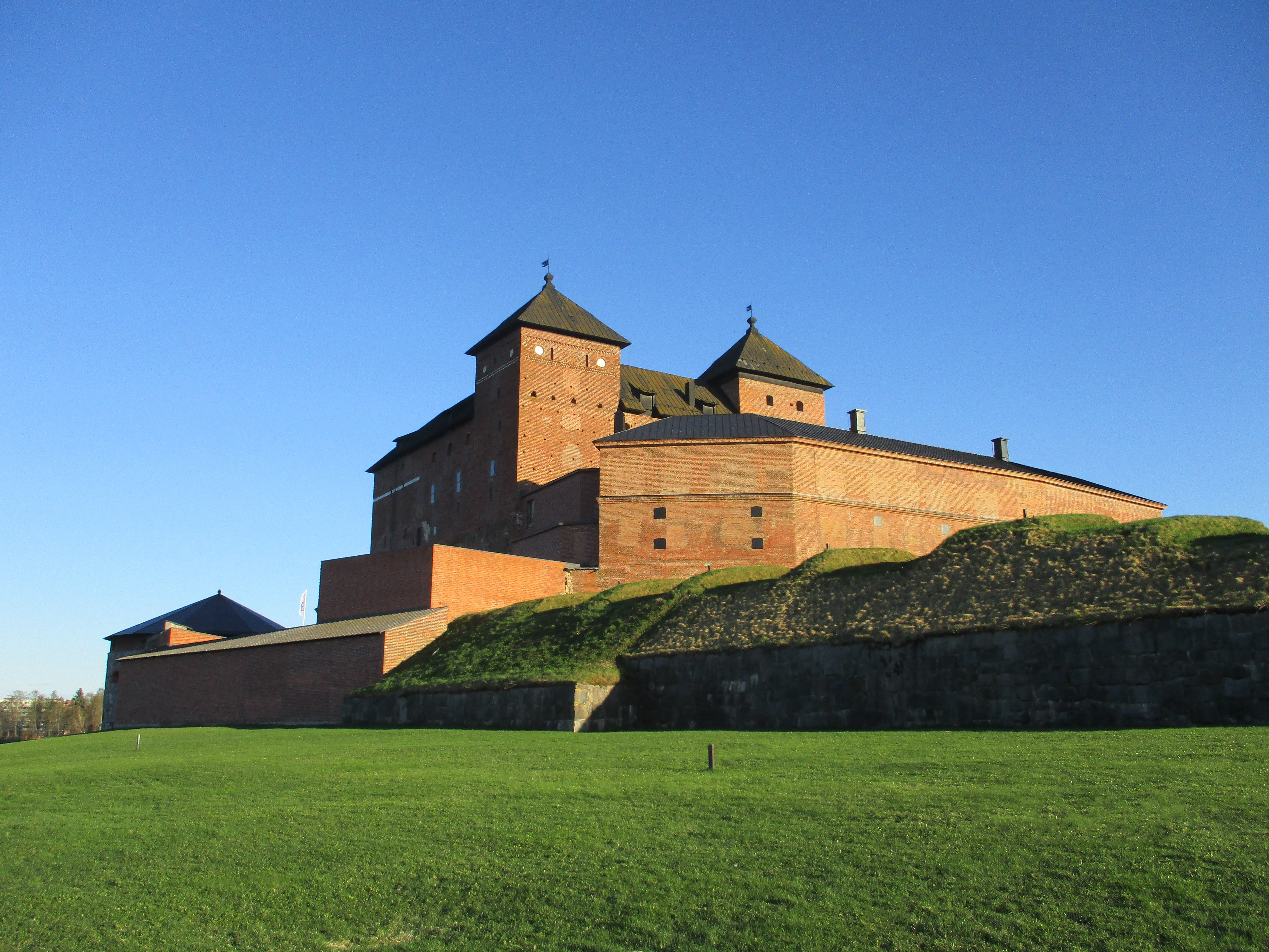 Hämeen linna; keskiaikainen linna Hämeenlinnassa